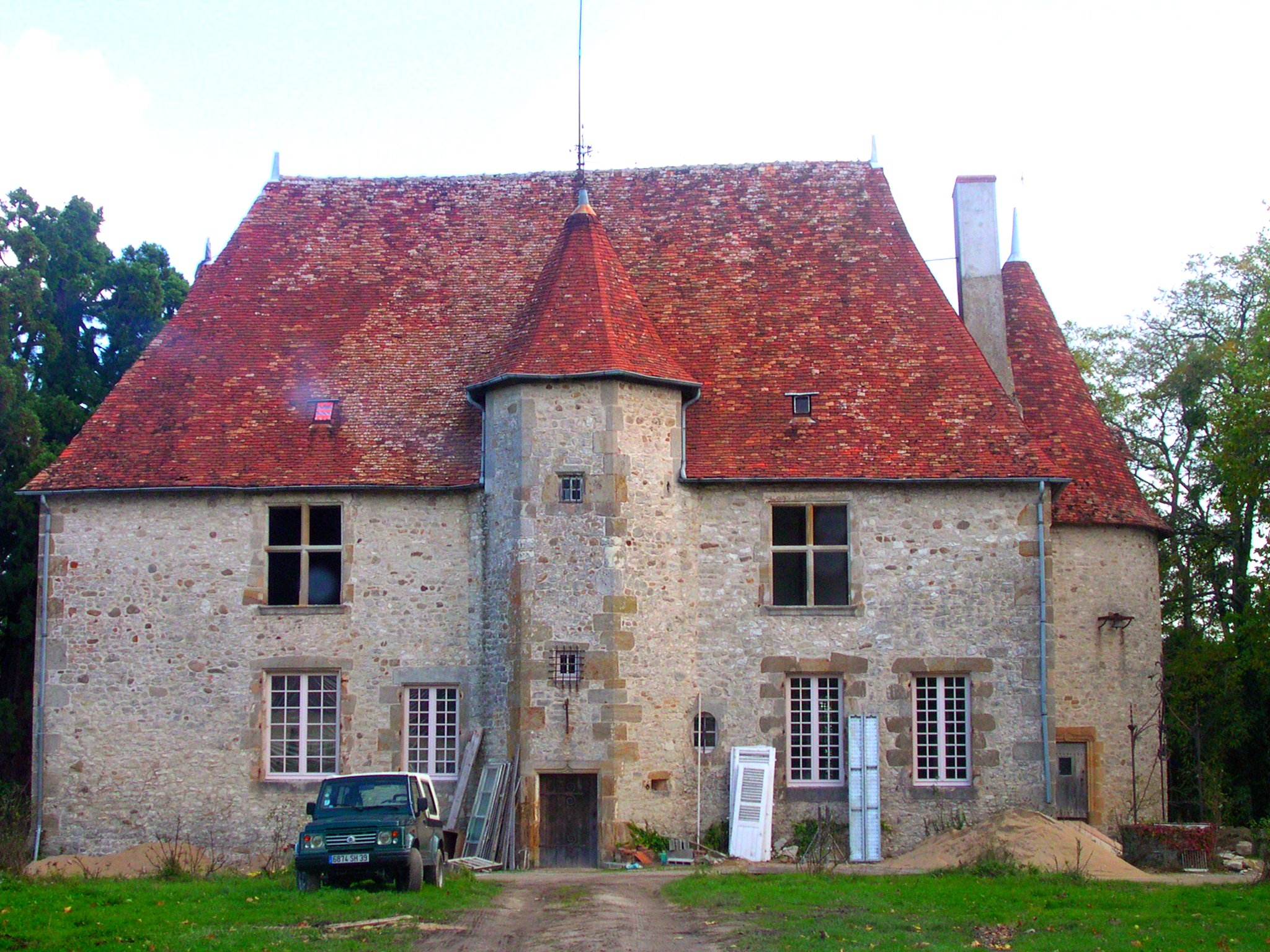 Le château des Ecossais à Bresnay, Allier, France.